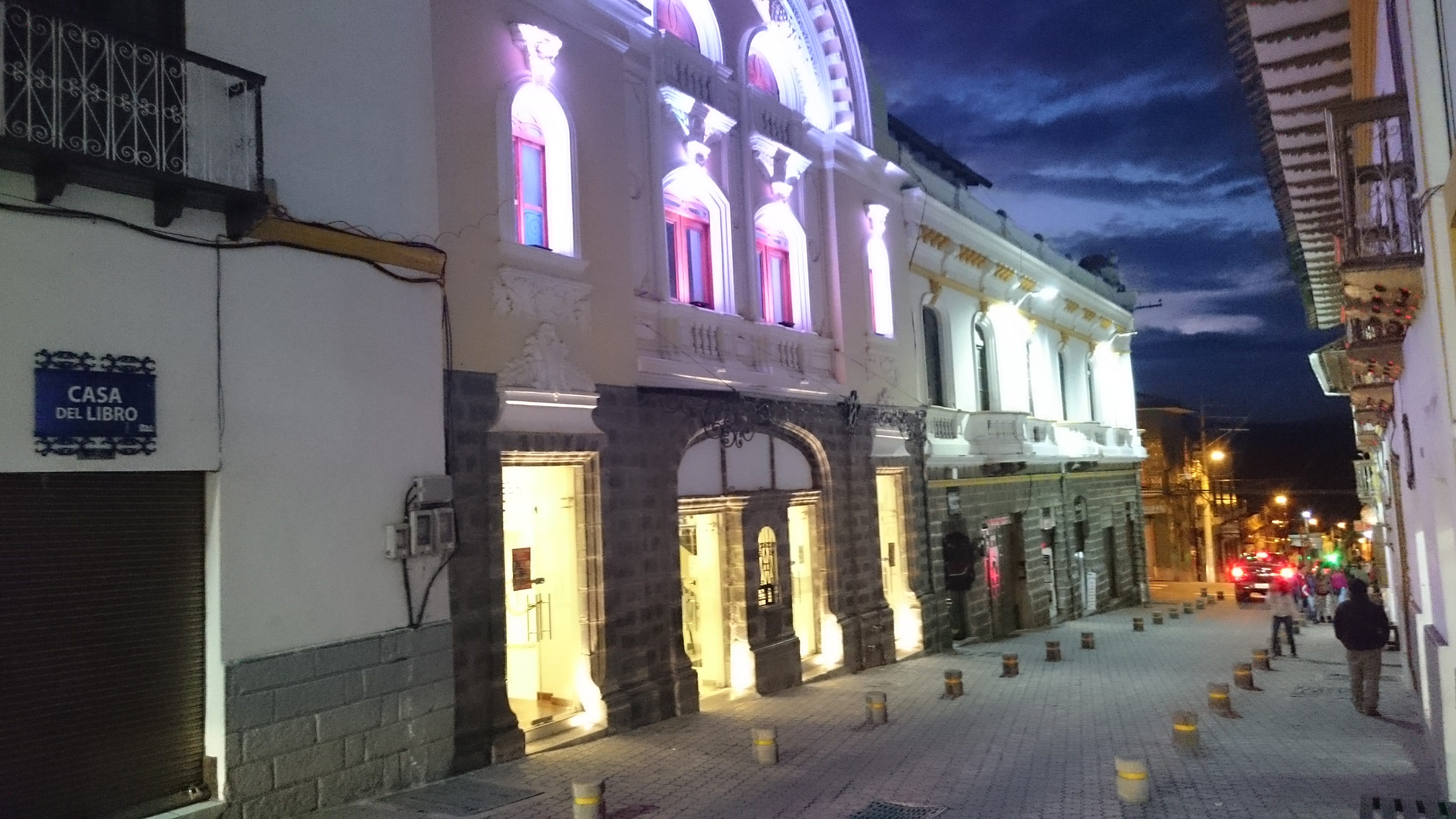 Teatro Lemarie en Tulcán - Ecuador